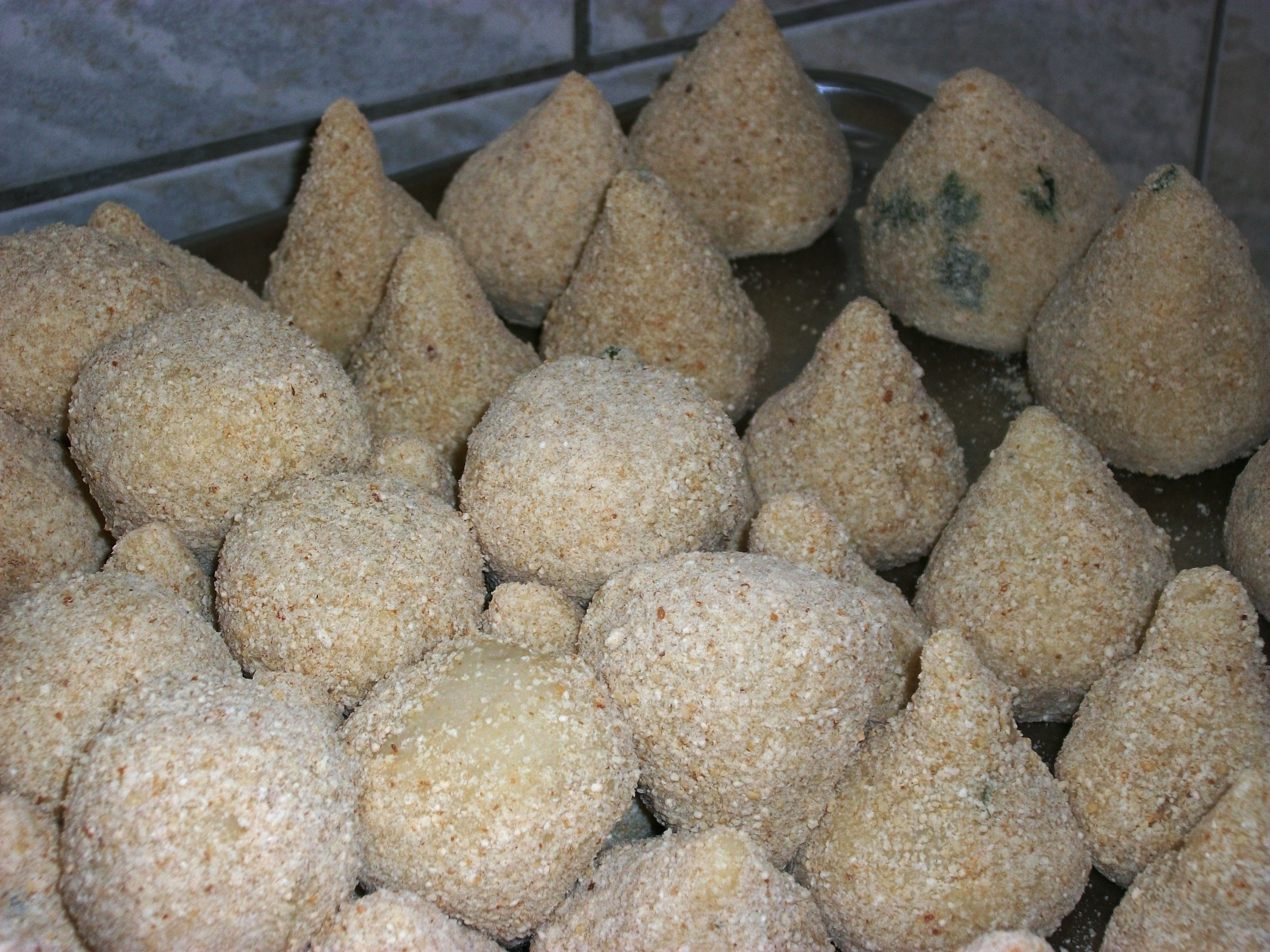 Coxinhas que ainda não foram fritas em óleo.